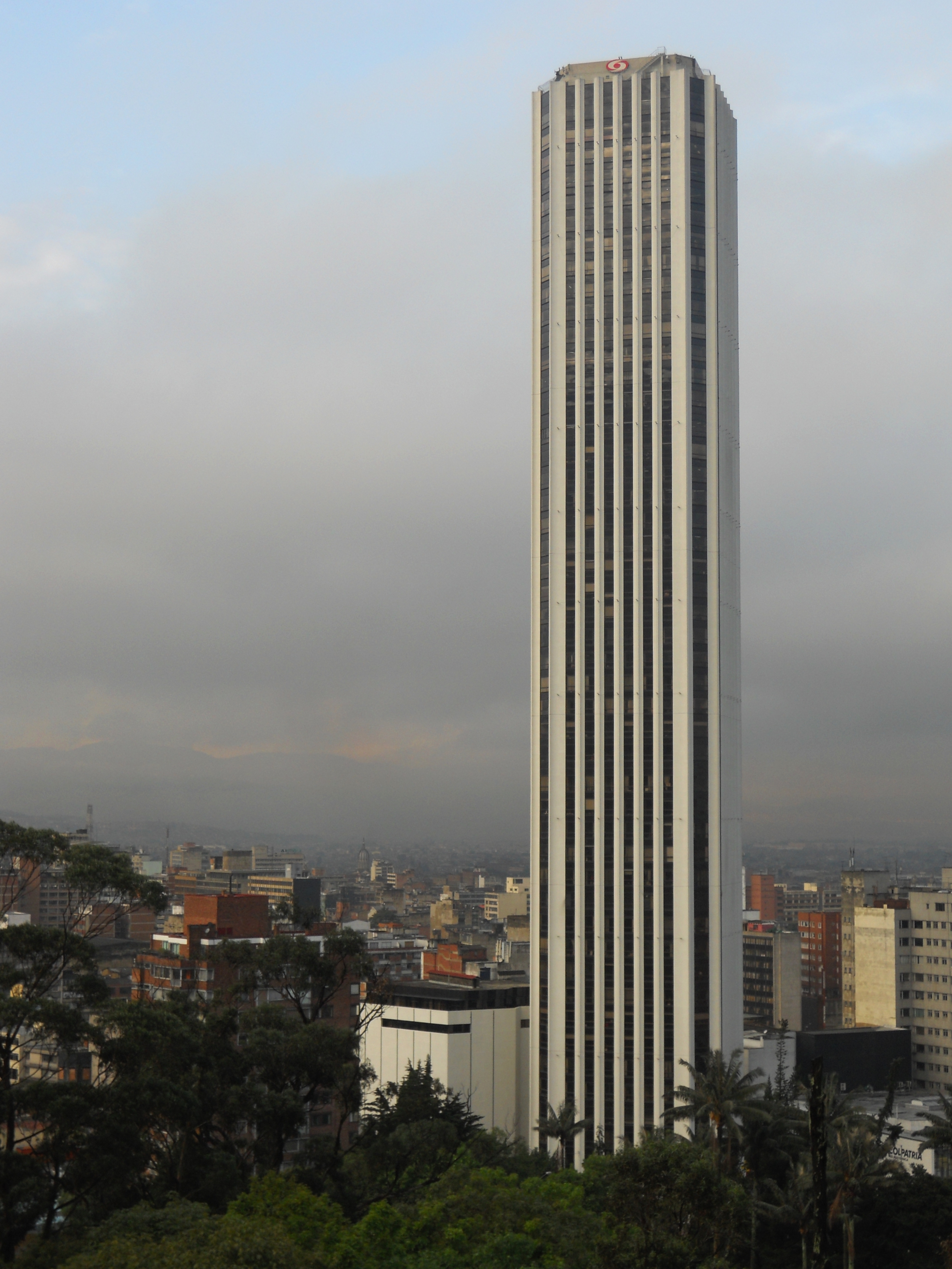 Torre Colpatria, Bogotá, costado oriental.